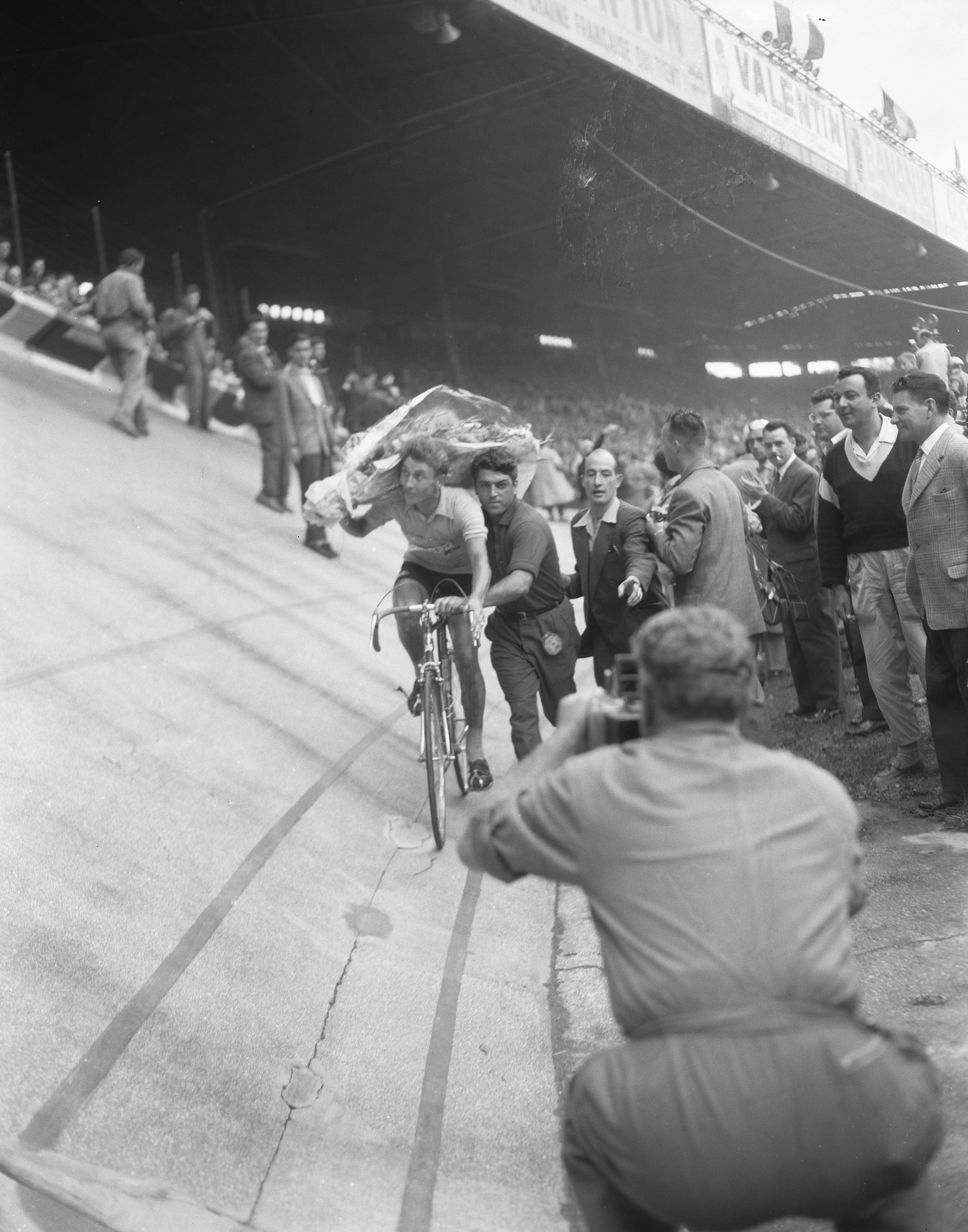 Collectie / Archief : Fotocollectie Anefo Reportage / Serie : Tour de France 1957 Beschrijving : Finish Tour de France in het Parc des Prince in Parijs. Winnaar Jacques Anquetil tijdens zijn ereronde Datum : 20 juli 1957 Locatie : Frankrijk, Parijs Trefwoorden : ererondes, wielrenners, winnaars Persoonsnaam : Anquetil, Jacques Instellingsnaam : Parc des Princes-stadion Fotograaf : Pot, Harry / Anefo Auteursrechthebbende : Nationaal Archief Materiaalsoort : Negatief (zwart/wit) Nummer archiefinventaris : bekijk toegang 2.24.01.04 Bestanddeelnummer : 908-7908